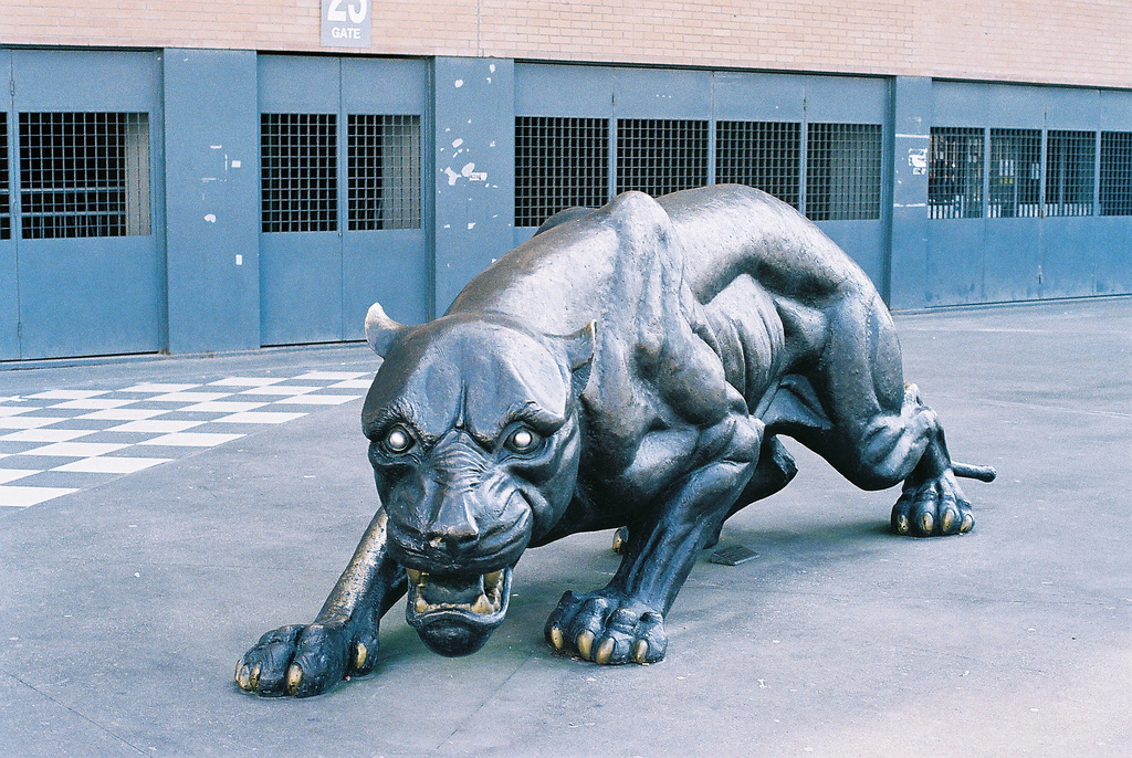 Porto, 2011.